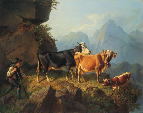 Auf dem Weg zur Alm, oil on canvas, 83 x 106 cm